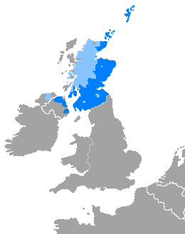 Idioma escocés